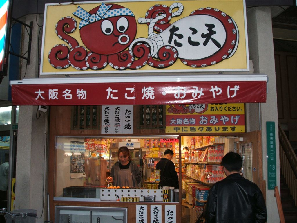 Tsutenkaku Tower, Osaka, Japan